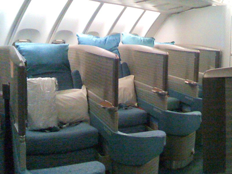 CX 747